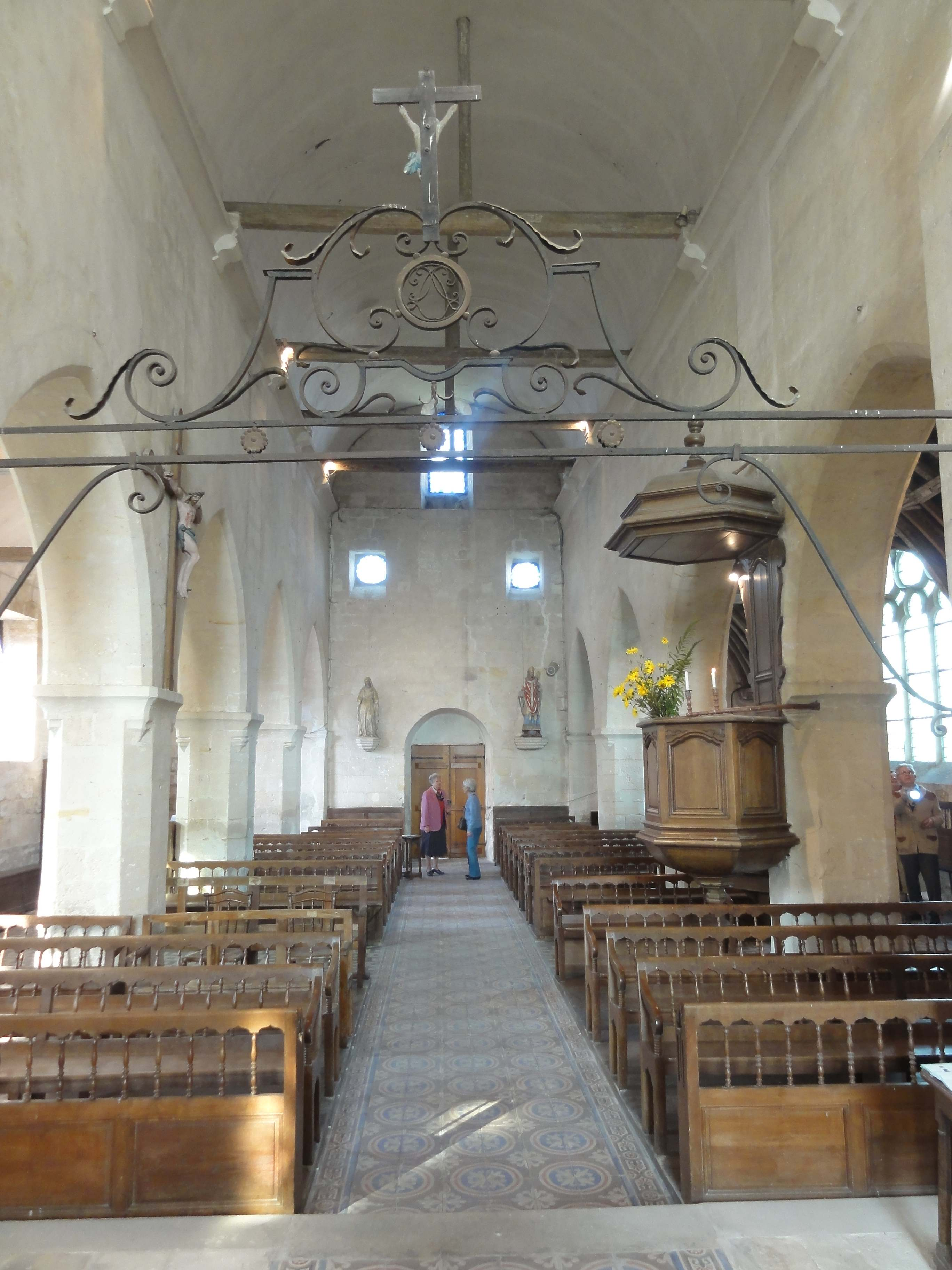 Intérieur de l'église - voir titre.